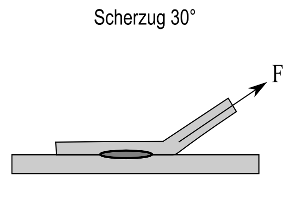 Prüfung von Kleinteilschweißverbindungen: Scherzugprüfung - Winkel 30°